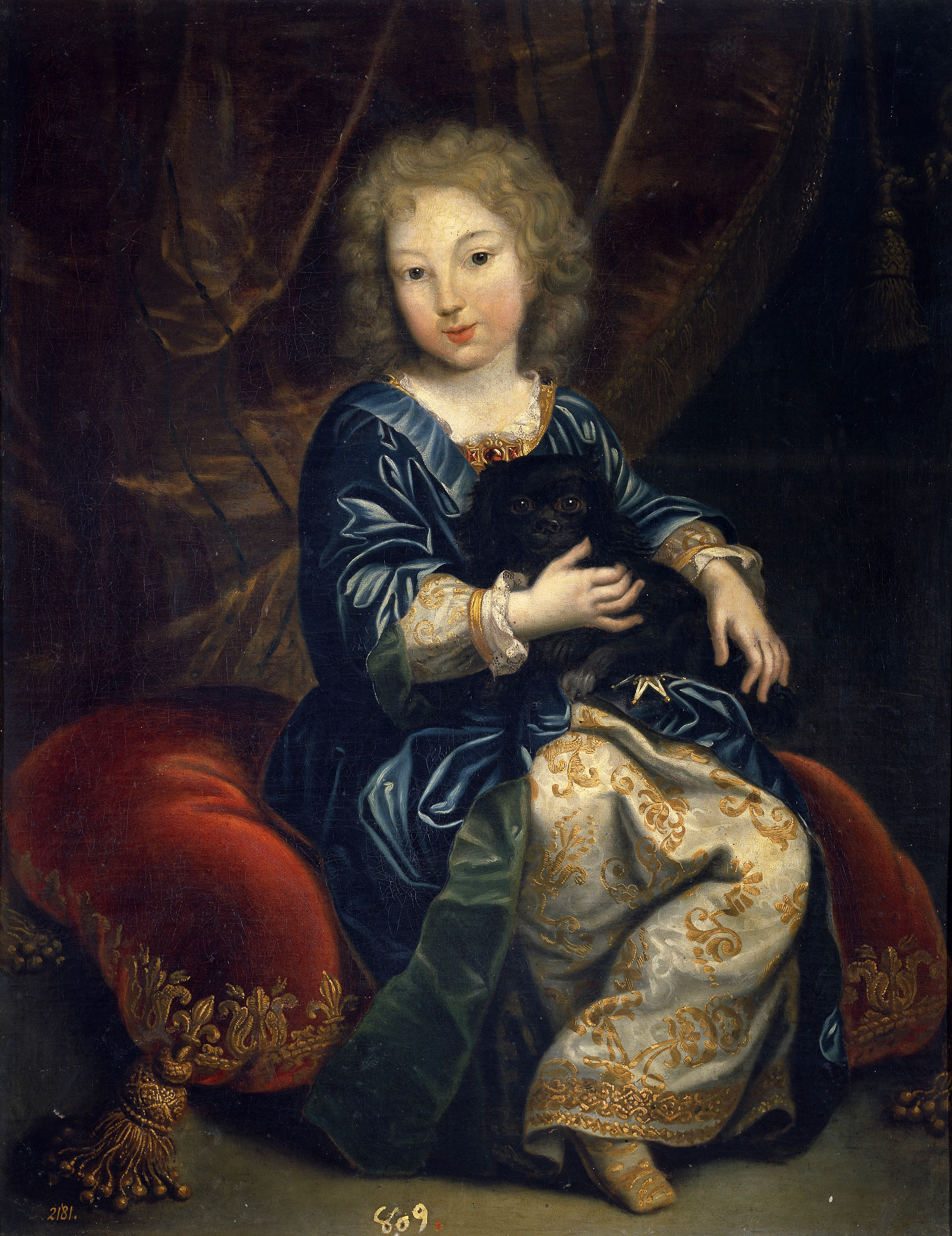 Retrato del rey Felipe V de España (1683-1746), que fue nieto del rey Luis XIV de Francia y el primer monarca de la Casa de Borbón en España. Aparece cuando todavía era Duque de Anjou. Aparece sobre un cojín bordado con las flores de lis emblemáticas abrazando a un perro negro. Vestido con riqueza, ostenta la banda e insignia del Saint-Esprit, orden fundada por su antepasado Enrique IV de Francia. La obra copia el mismo personaje que se encuentra en el retrato El Gran Delfín y su familia (Museo de Versalles) en el que se le ve con sus padres y hermanos (Texto extractado de Luna, J. J.: El niño en el Museo del Prado, Museo del Prado, 1983).